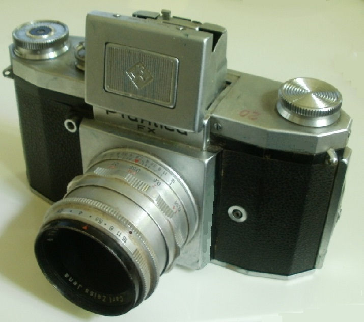 Spiegelreflexkamera Praktica FX von VEB Kamerawerke Dresden